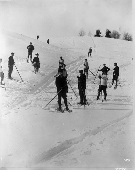 Skiing up Gatineau, Quebec